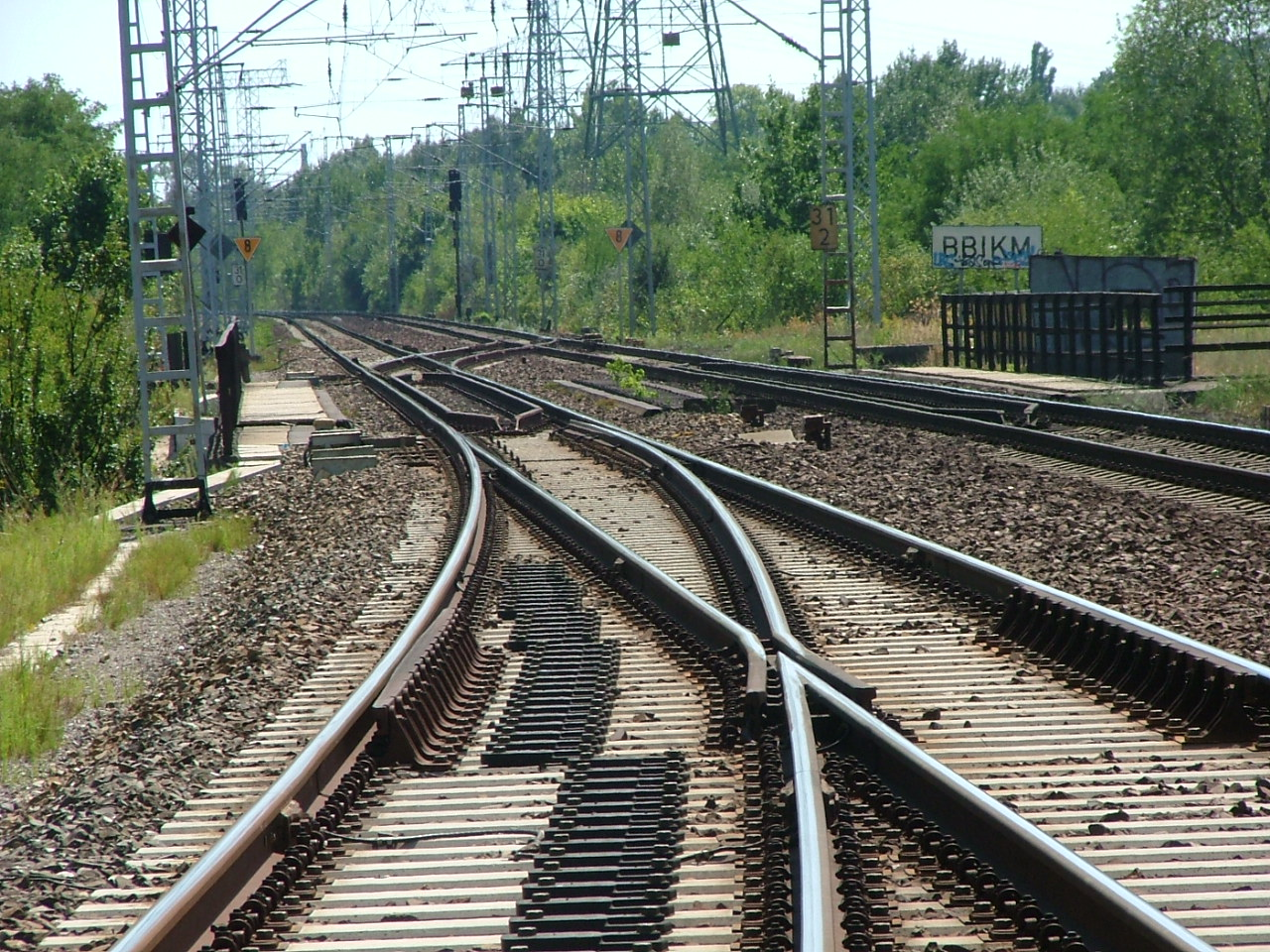 Biesdorfer Kreuz: Auffahrt der Strecke 6075 von BBIKO in BBIKM auf den Berliner Außenring (6080)